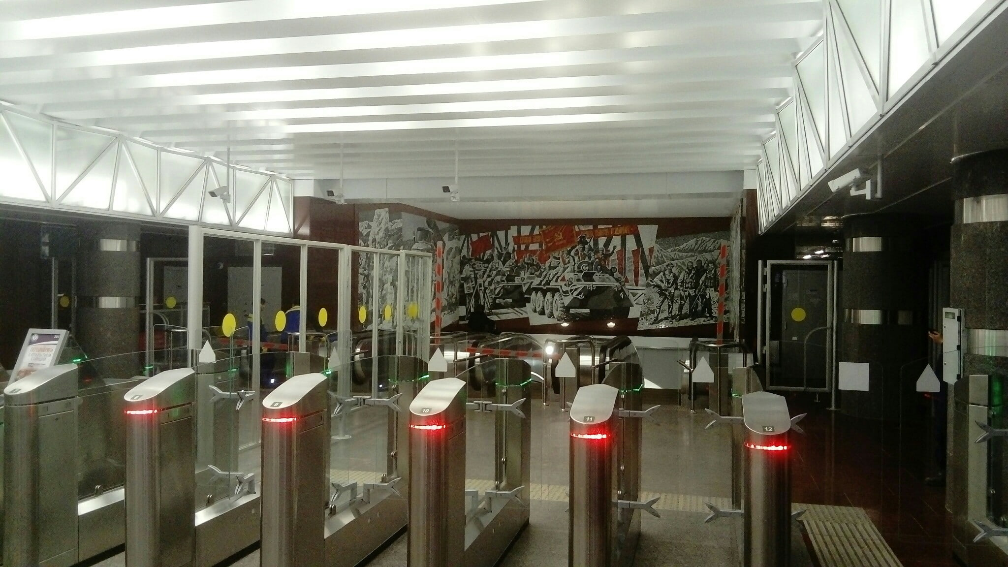 вестибюль станции Проспект Славы (северный выход, панно посвященное воинам-интернационалистам)